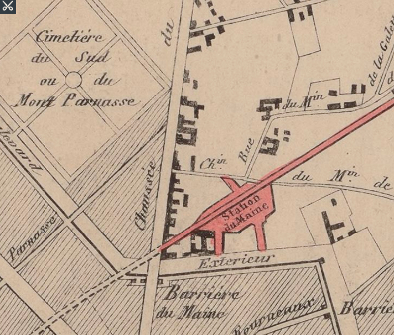 Détail plan Chemin de fer de Paris à Versailles (rive gauche de la Seine) : station du Maine. N.B. Le nord est en bas.